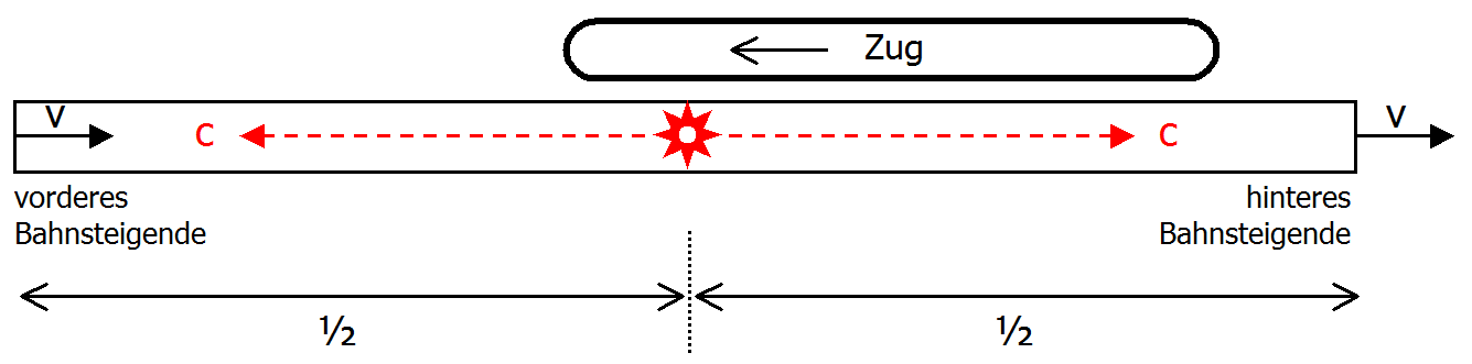 Grafische Erläuterung zum Gedankenexperiment "Gleichzeitigkeit"